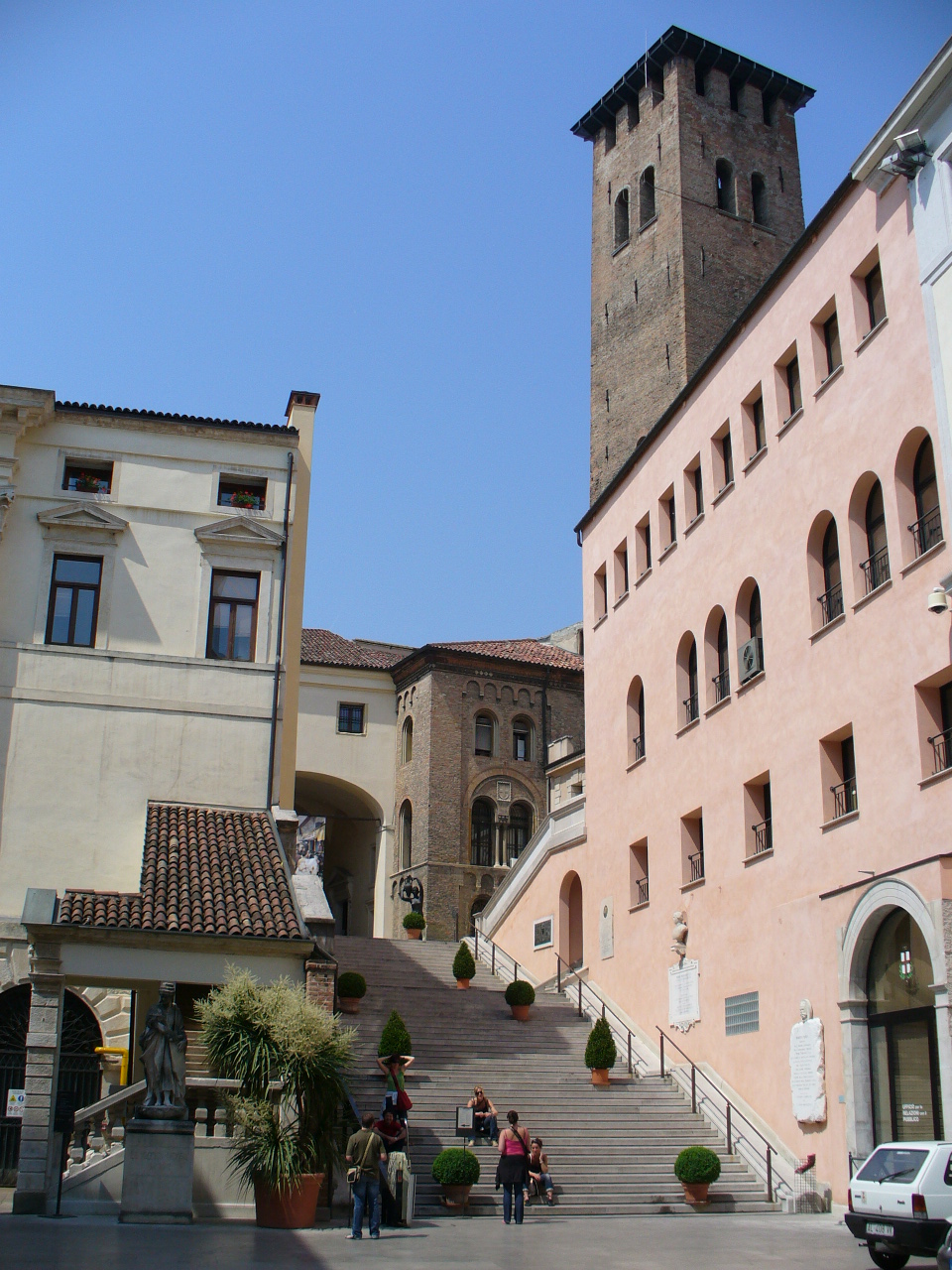 Atrás da prefeitura